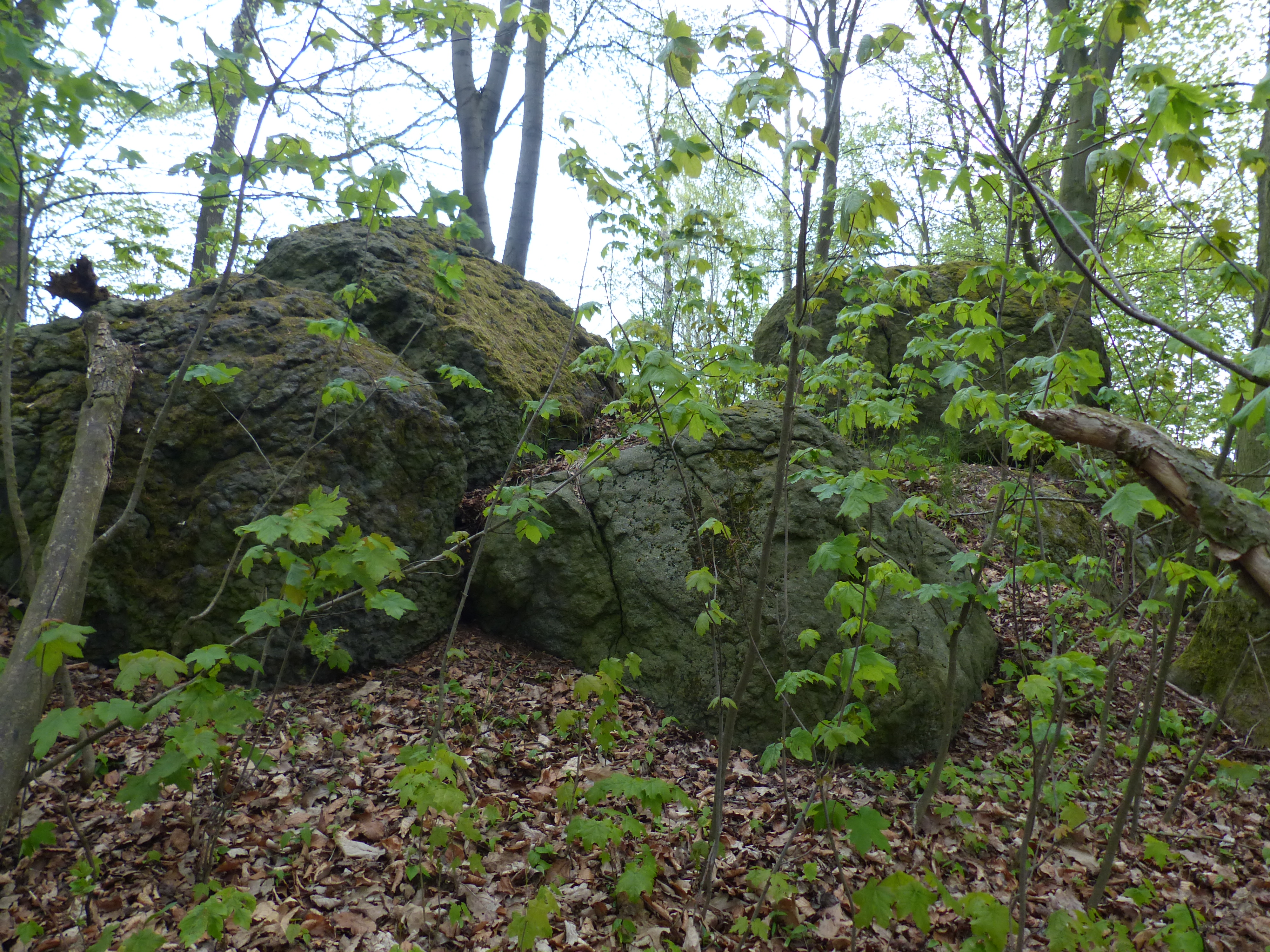 Redwitzitkuppe Bühl W von Wölsauerhammer